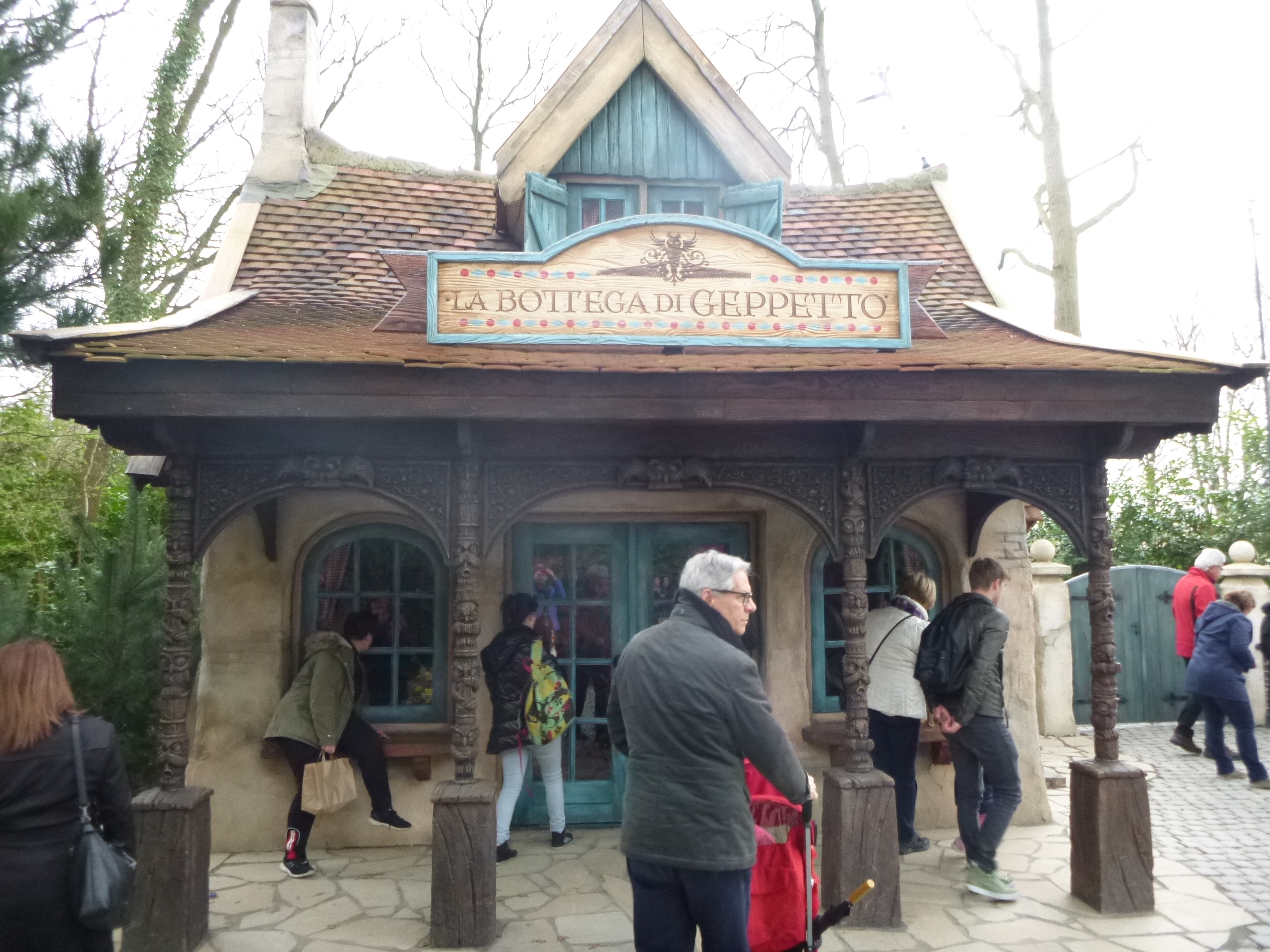 Pinokkio sprookjebos : Bottega di Geppetto